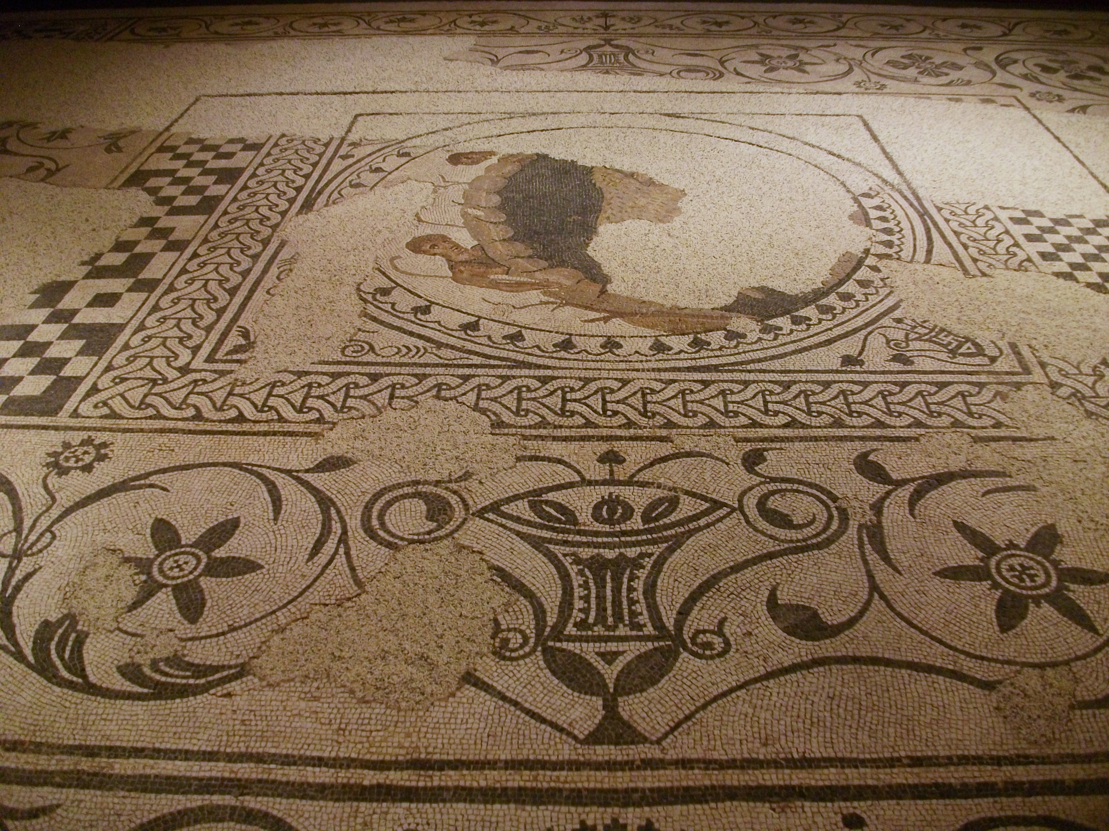 Mosaic de la vil·la romana de Font de Mussa (benifaió, Ribera Alta) al Museu de Prehistòria de València. ës un mosaic d'opus tessellatum amb decoració bícroma de motius geomètrics i vegetals. Té un medalló central polícrom on apareix representat el pastor Fàustul i el seu germà davant la cova on una lloba alletaria a Ròmul i Rem. Segles I-II.